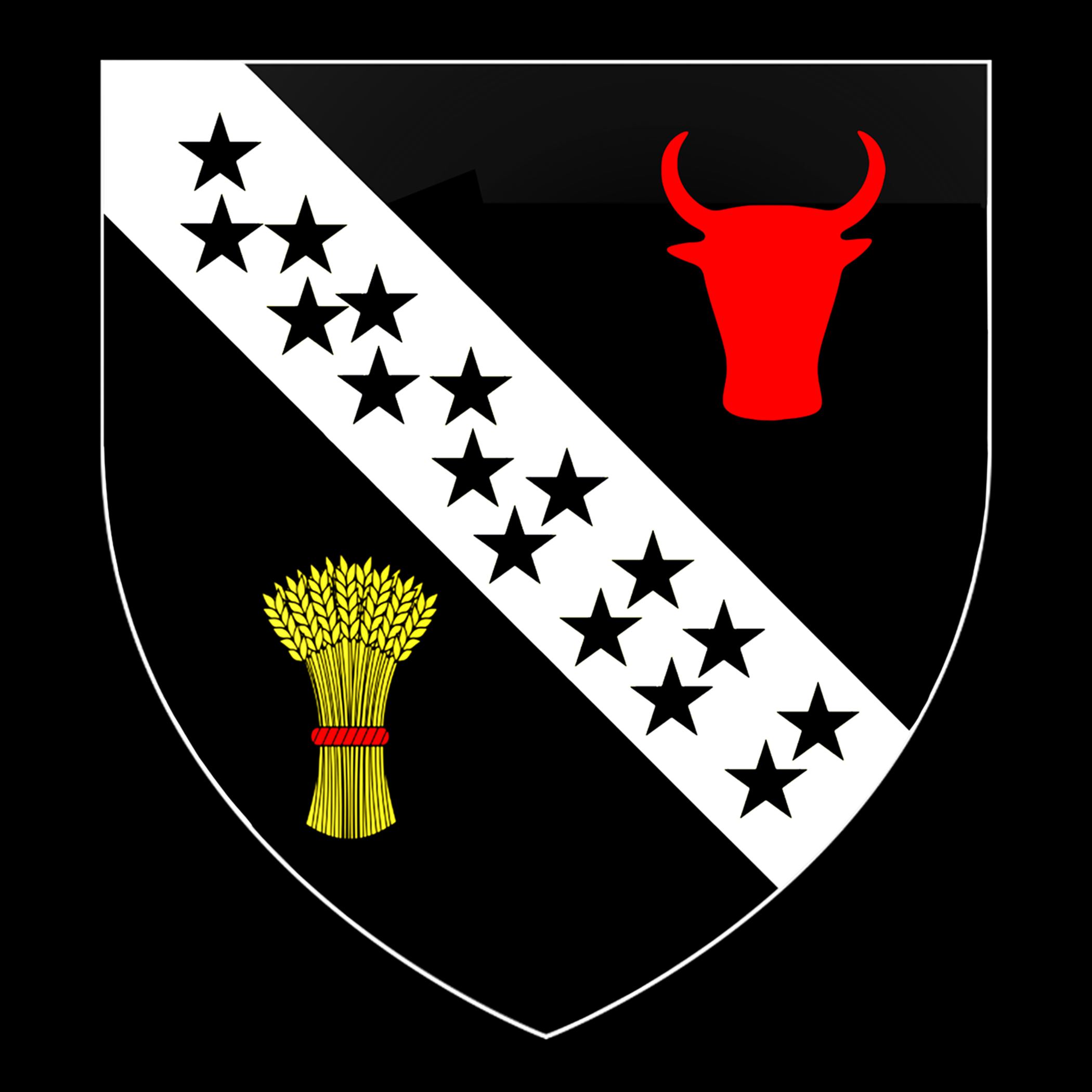 D'ILLIERS (Louis), L'Histoire d'Orléans, MCMXL